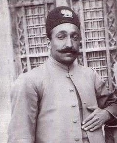 امیرشوکت الملک خزیمه علم